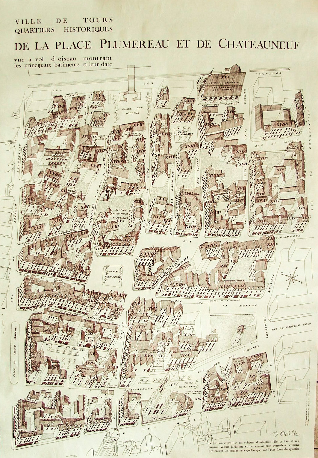 Vieux tours, quartier saint martin, plan en élévation 1968, auteur Pierre Boille